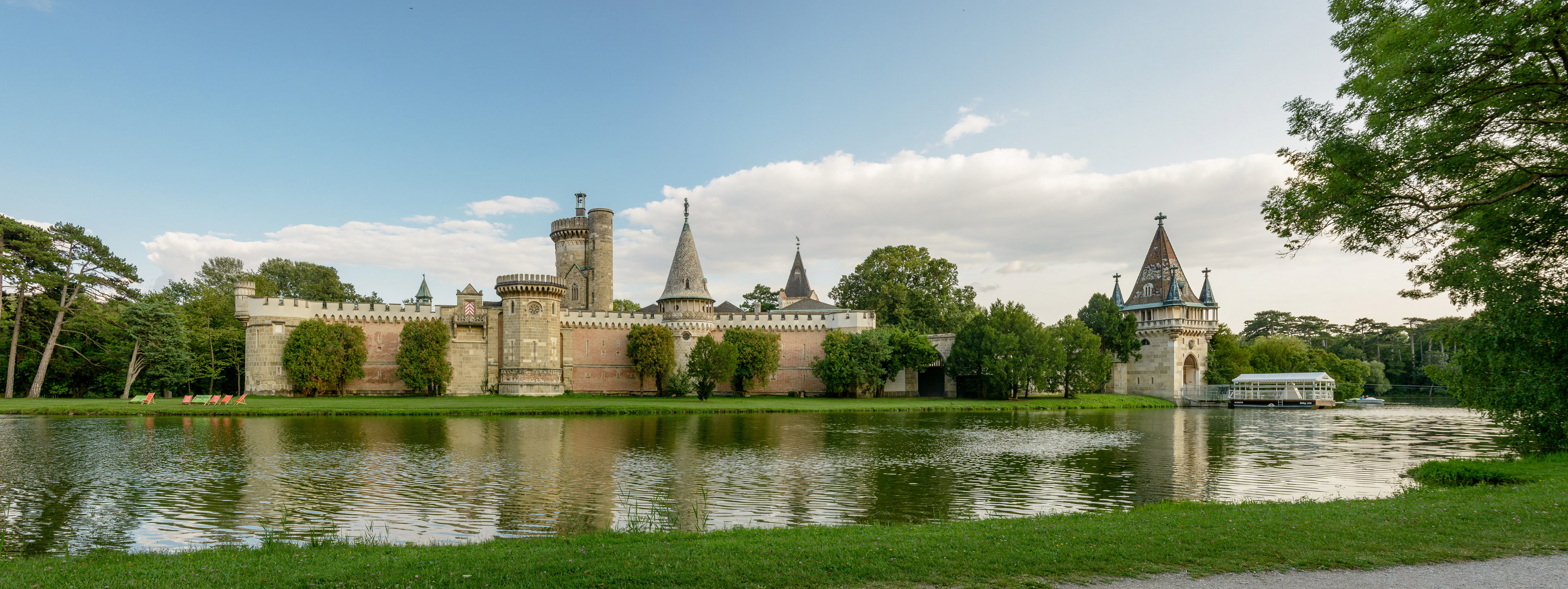 Franzensburg, Schlosspark Laxenburg